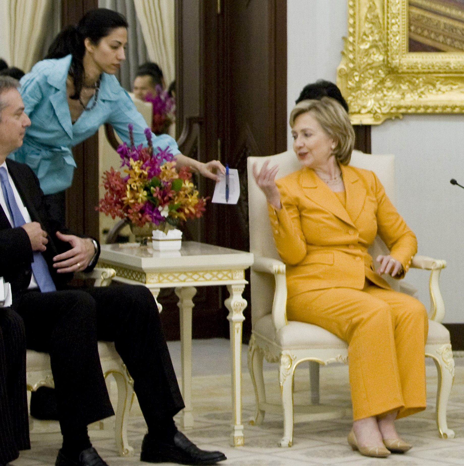 นาง Hillary Clinton รัฐมนตรีว่าการกระทรวงการต่างประเทศสหรัฐอเมริกา เข้าเยี่ยมคารวะ นายกรัฐมนตรี 21 กรกฎาคม 2552เชื่อมั่นประเทศไทยกับนายกอภิสิทธิ์ ณ ​ตึกไทยคู่ฟ้า 19 กรกฎาคม 2552 (The Official Site of The Prime Minister of Thailand Photo by พีรพัฒน์ วิมลรังครัตน์)